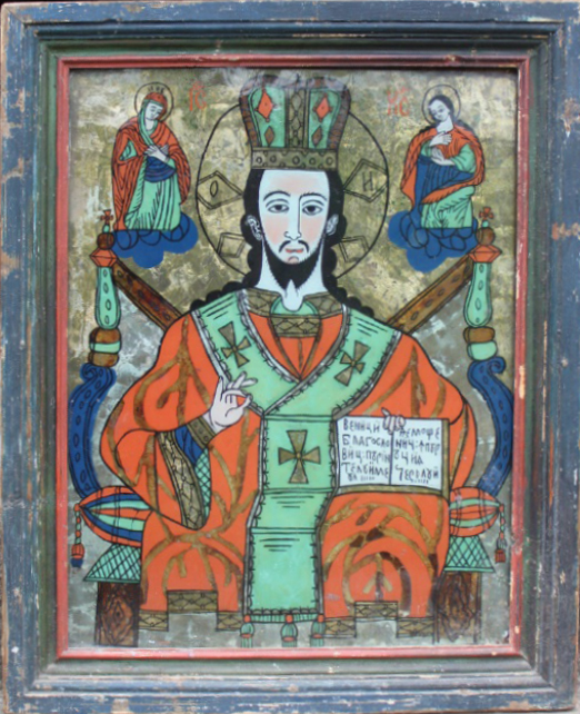 Icoană de la biserica de lemn din Măleni, județul Sălaj.